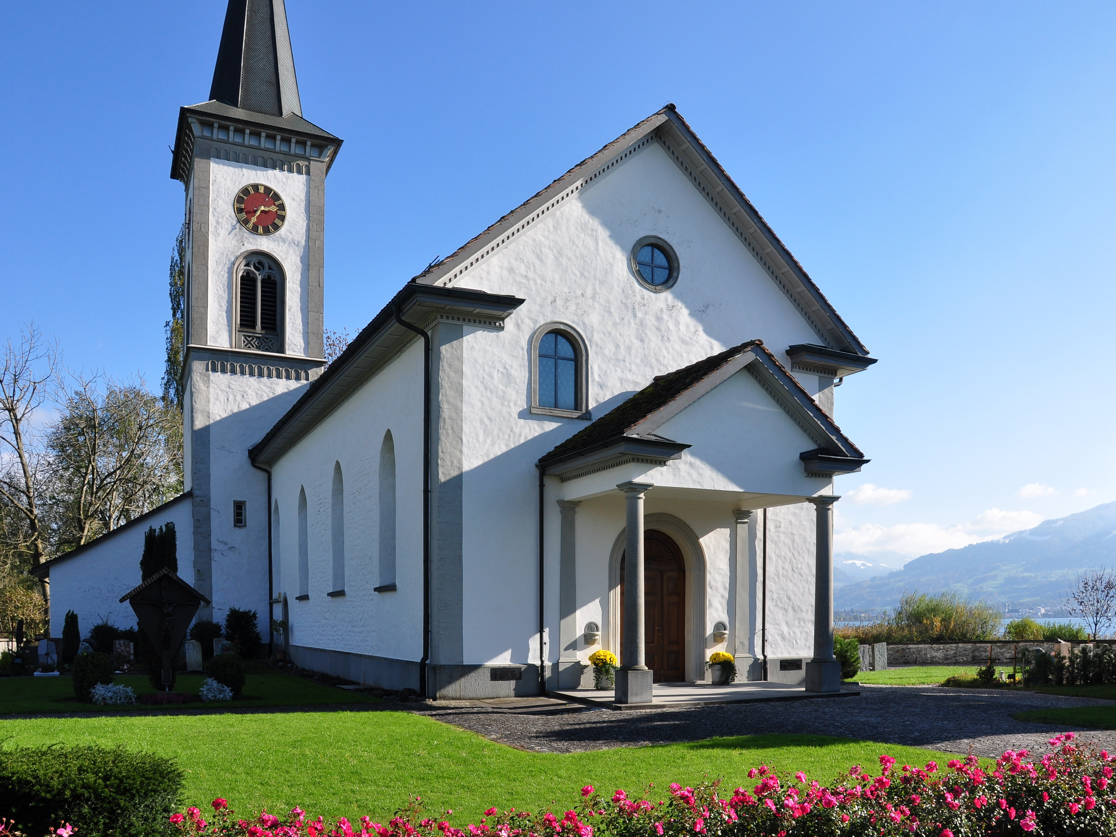 Busskirch in Jona (Switzerland) on Obersee (upper Lake Zürich) shore